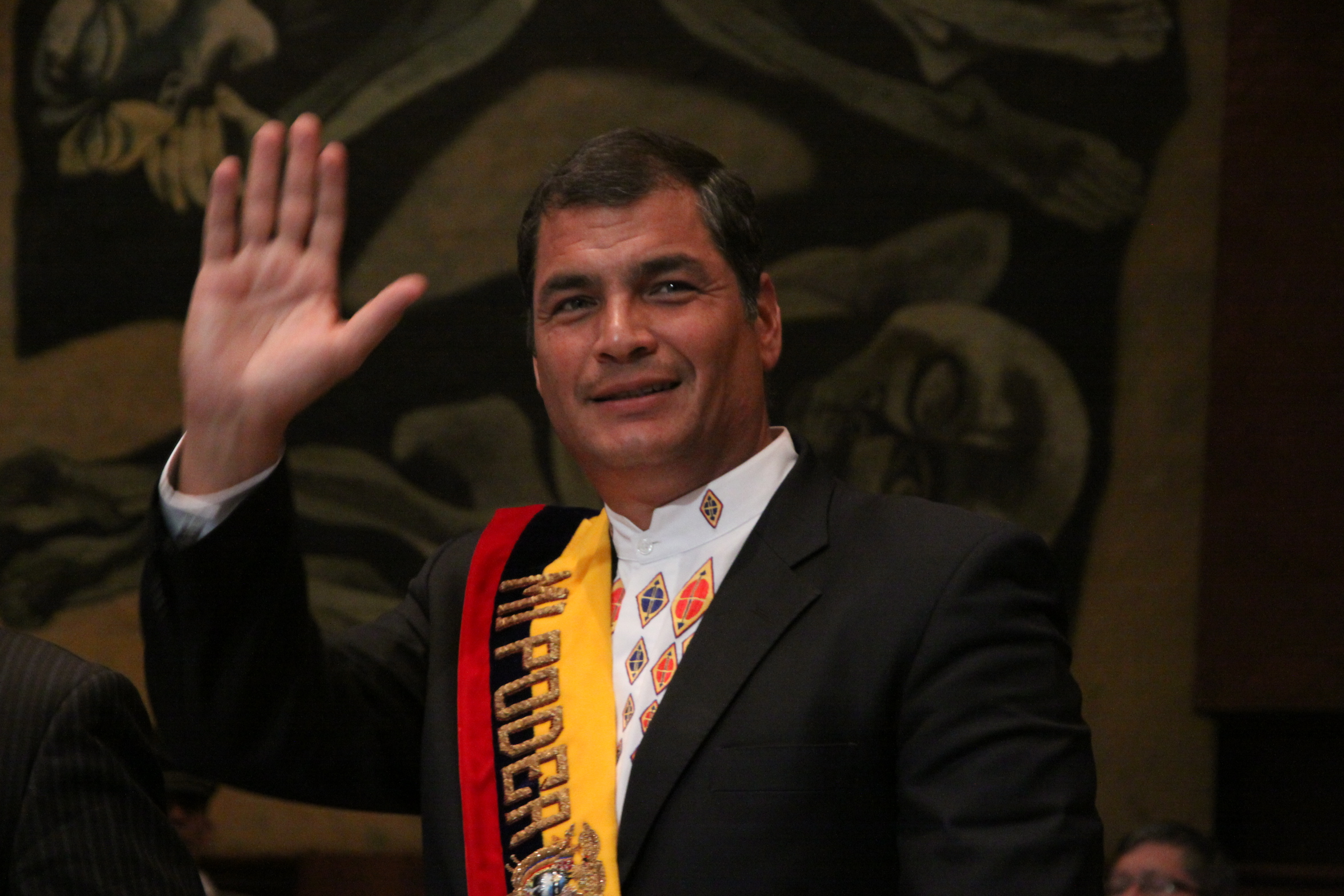 Informe a la Nación 10-08-2010